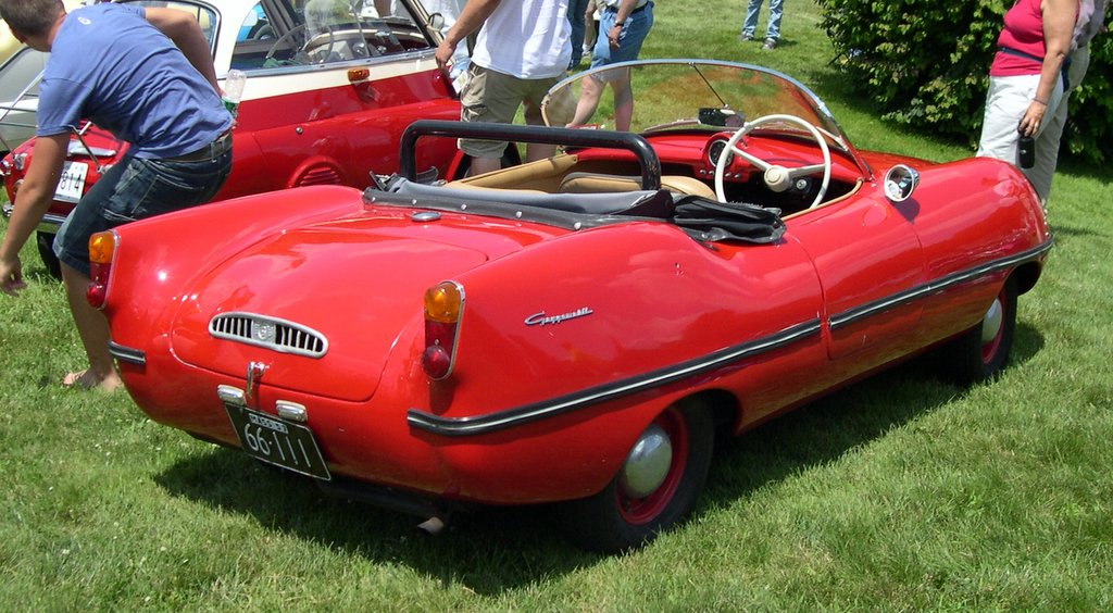 Dart